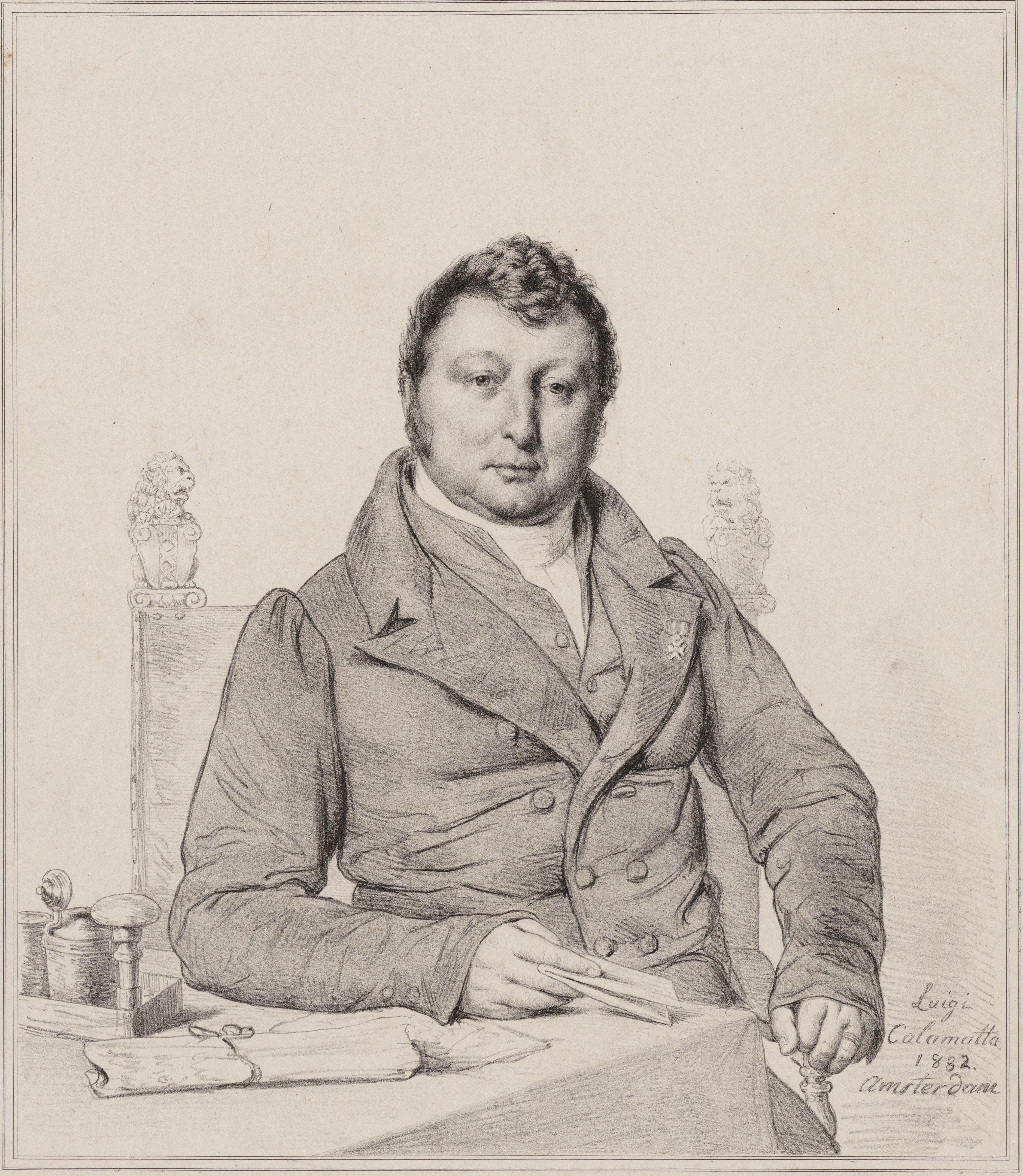 Frederik van de Poll (1780-1853); Mayor of Amsterdam from 1828 to 1836